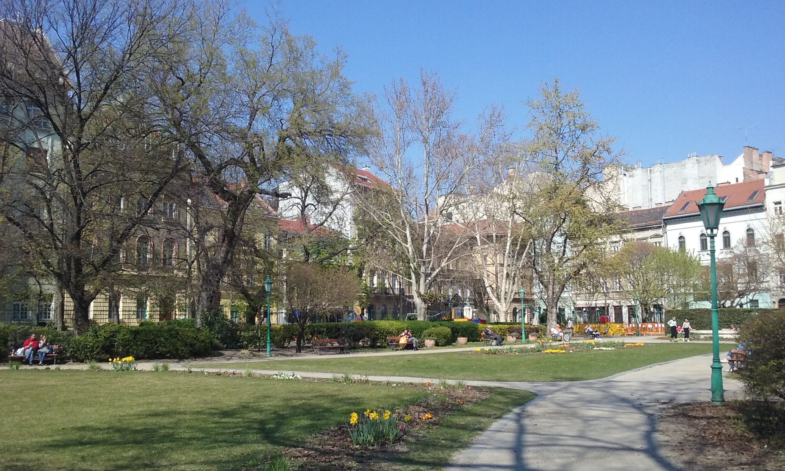 Látogatók a Károlyi-kertben a koronavírus-járvány idején, Budapest